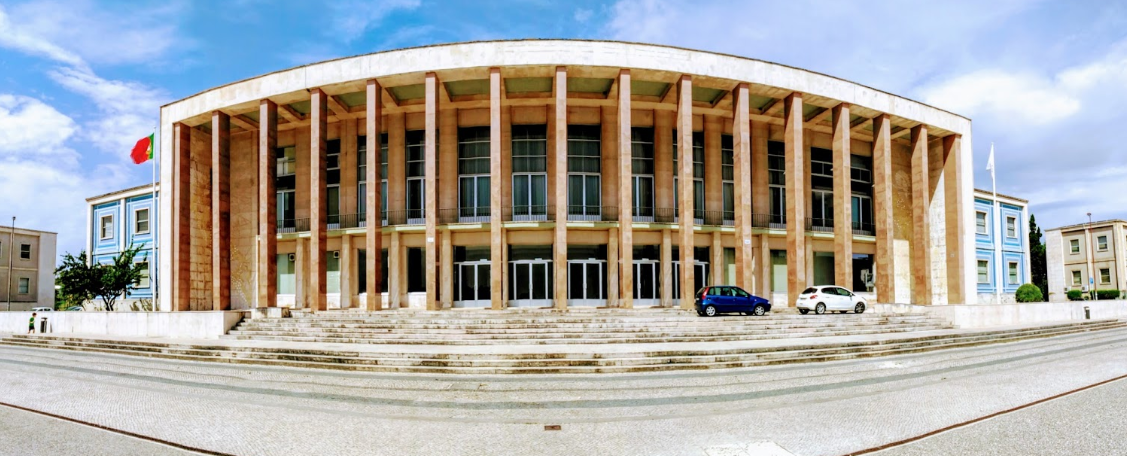 Bâtiment principal de l'Université de Lisbonne